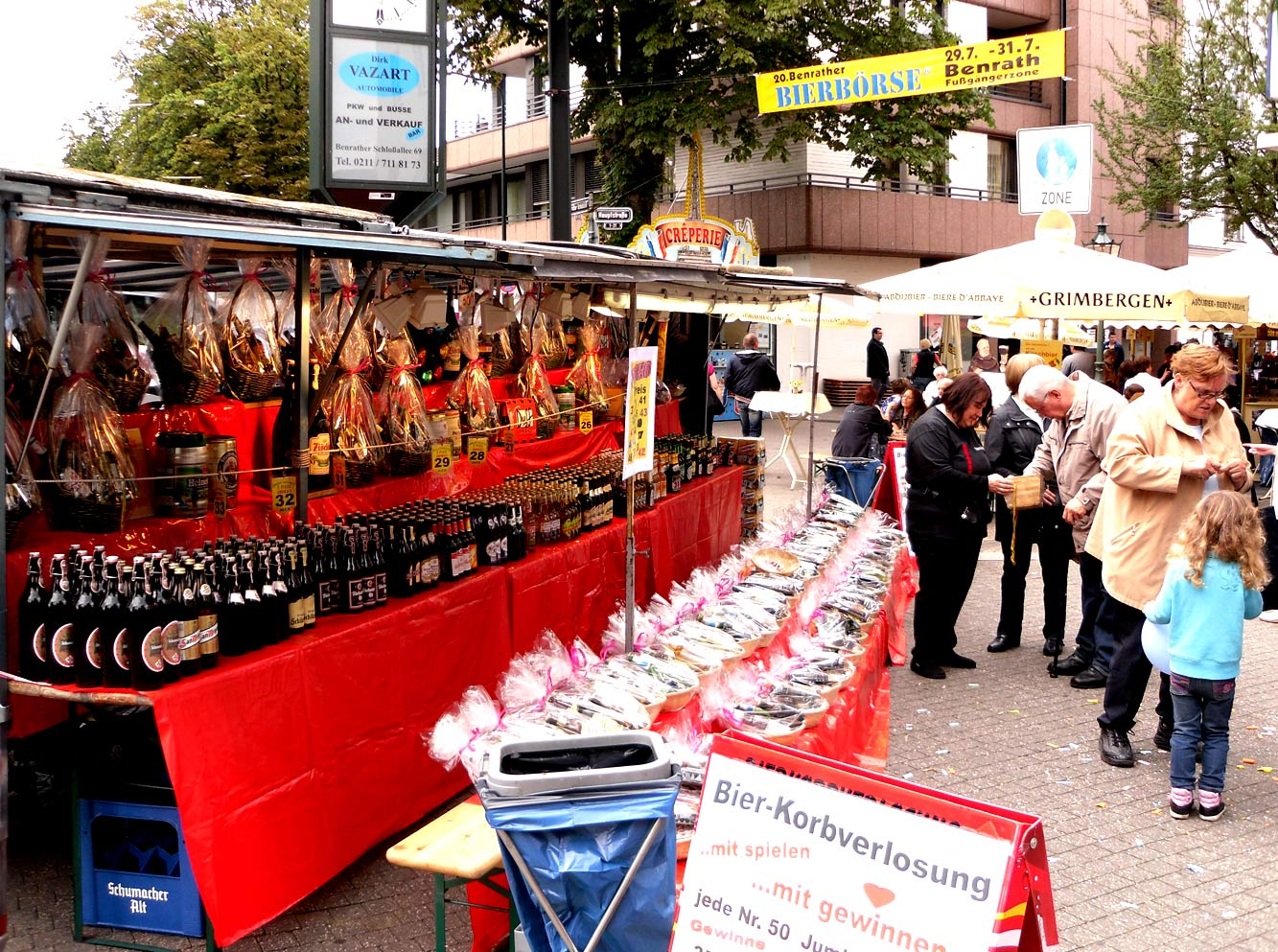 20.Benrather Bierbörse, 29-31 July 2011